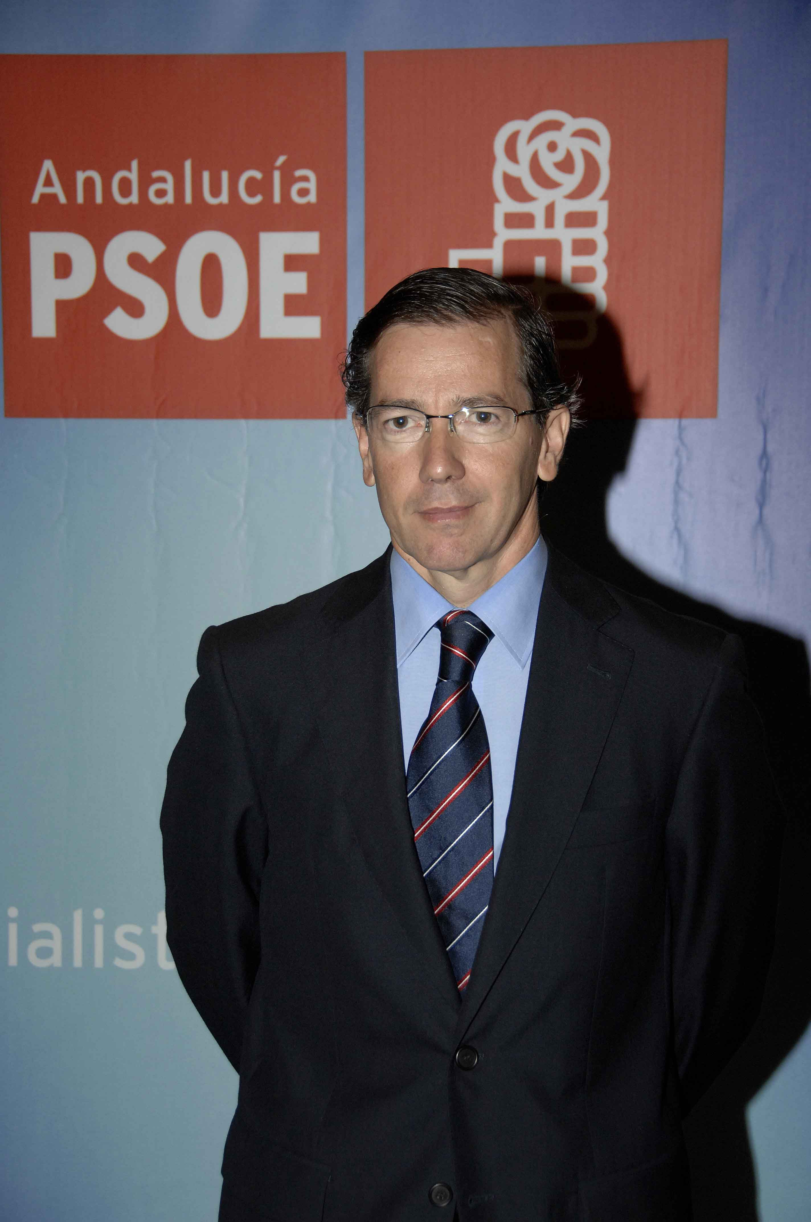 Fotografía de Bernardino León Gross